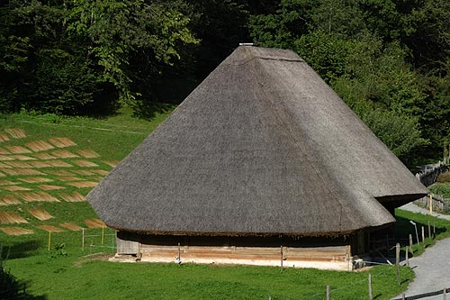 Freilichtmuseum Ballenberg